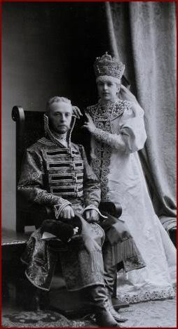 Гофмейстер Двора Е.И.В. Великого Князя Михаила Николаевича, генерал-лейтенант Пётр Петрович Баранов (Петер Пауль Александр фон Баранов) в одеждах стольника XVII века и его дочь Ольга Петровна Баранова в одеждах для танца "Русской".